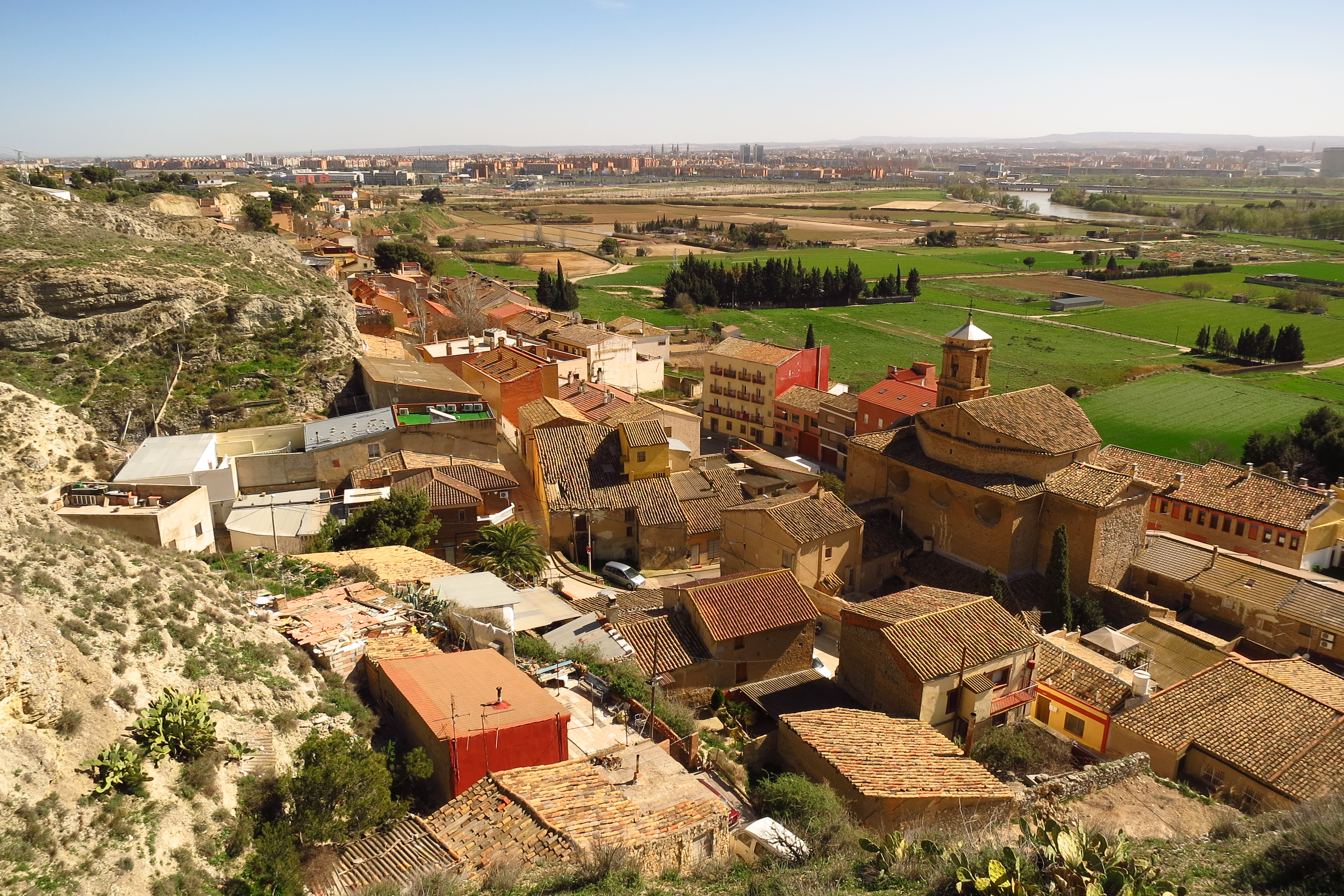 Juslibol (Zaragoza, Aragón, España) - Vista hacia el pueblo y Zaragoza desde el castillo.